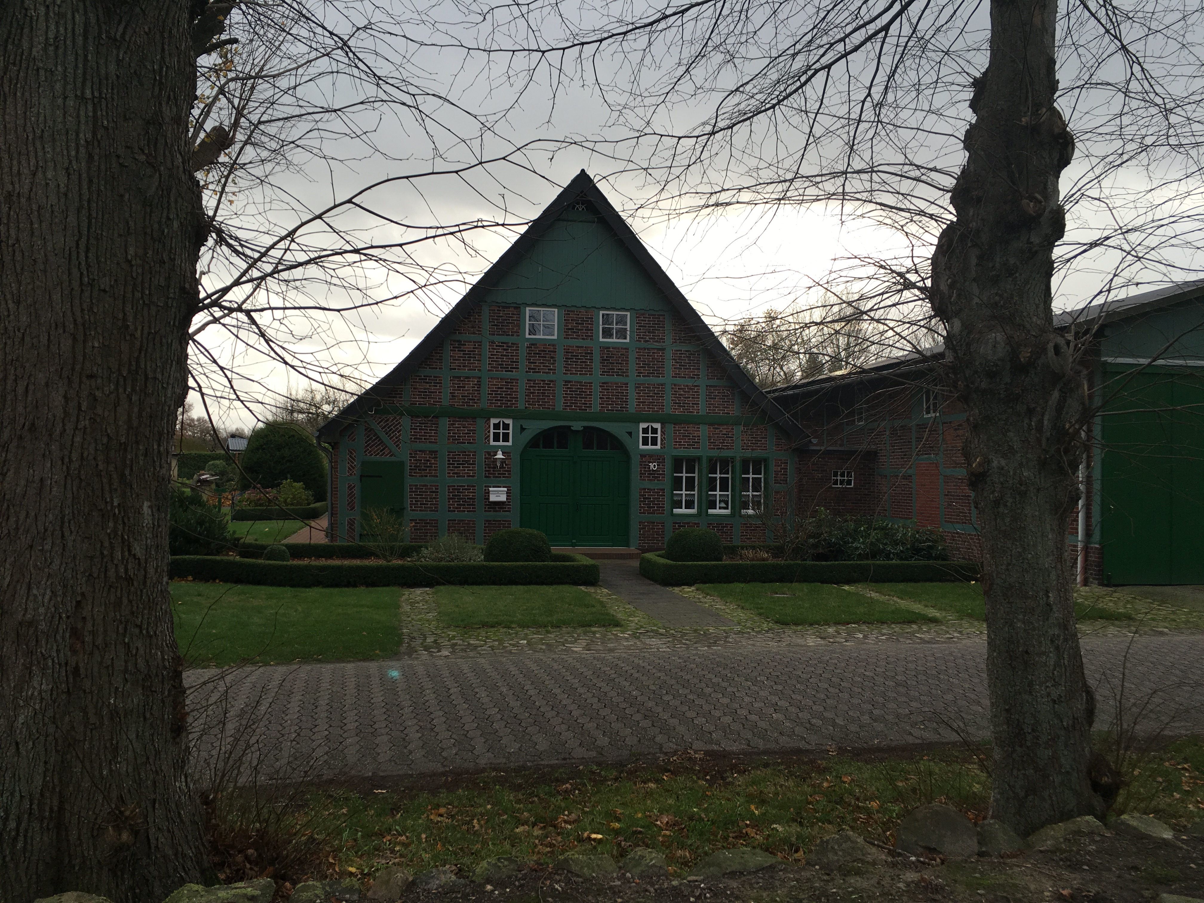 Fackwarkhuus in Örel